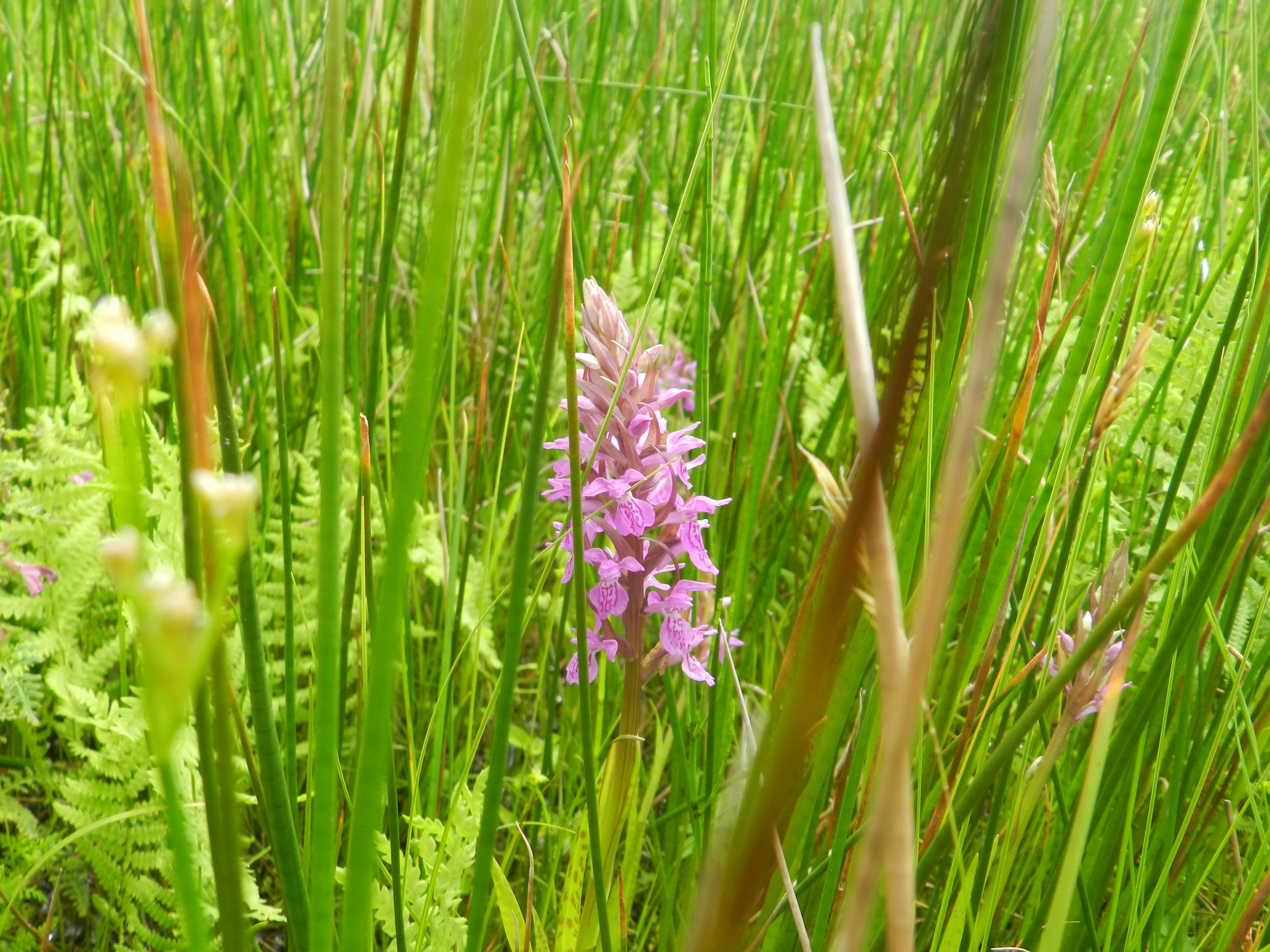 Tienhovenseplassen